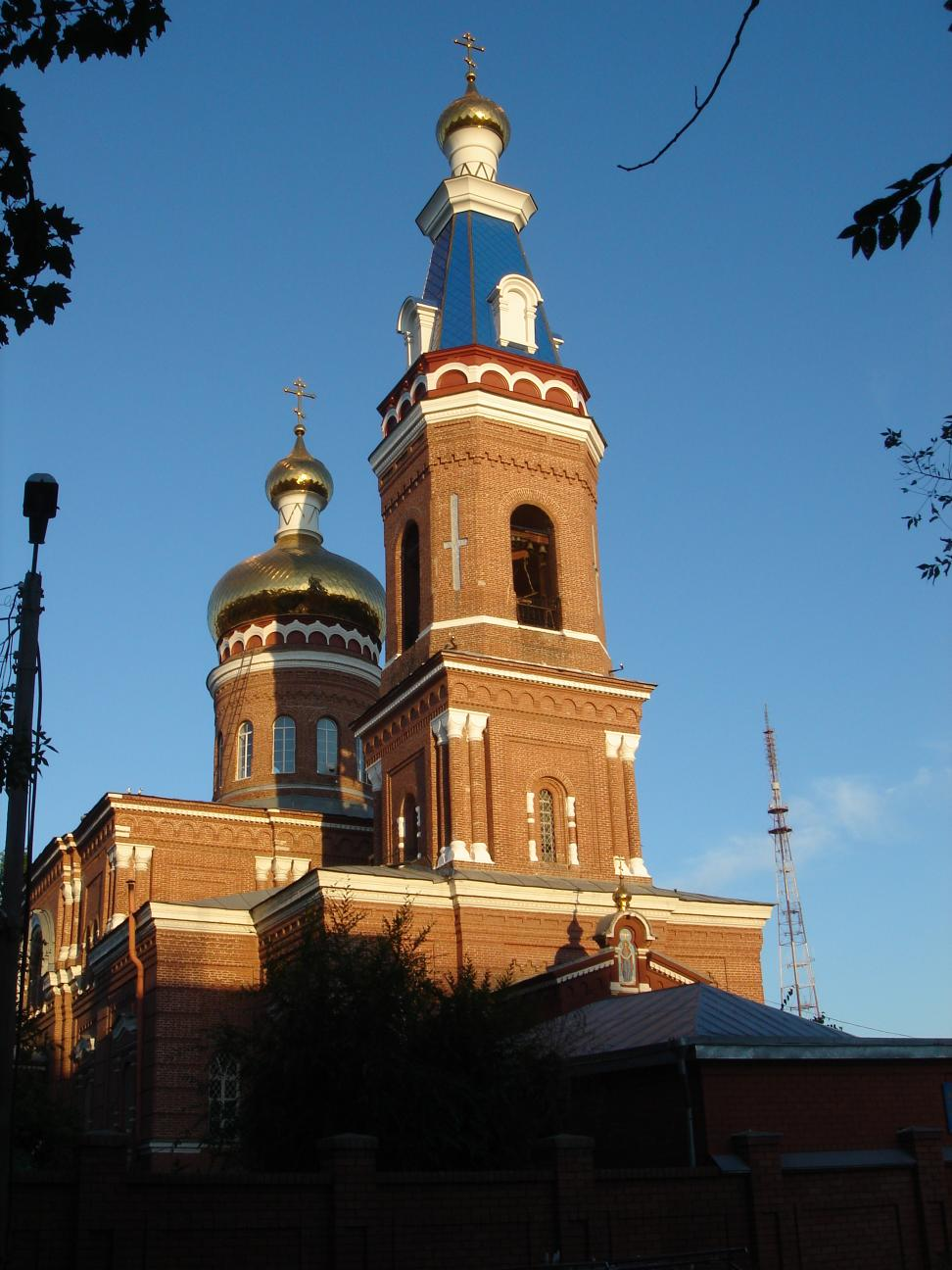 Покровский кафедральный собор в Астрахани.